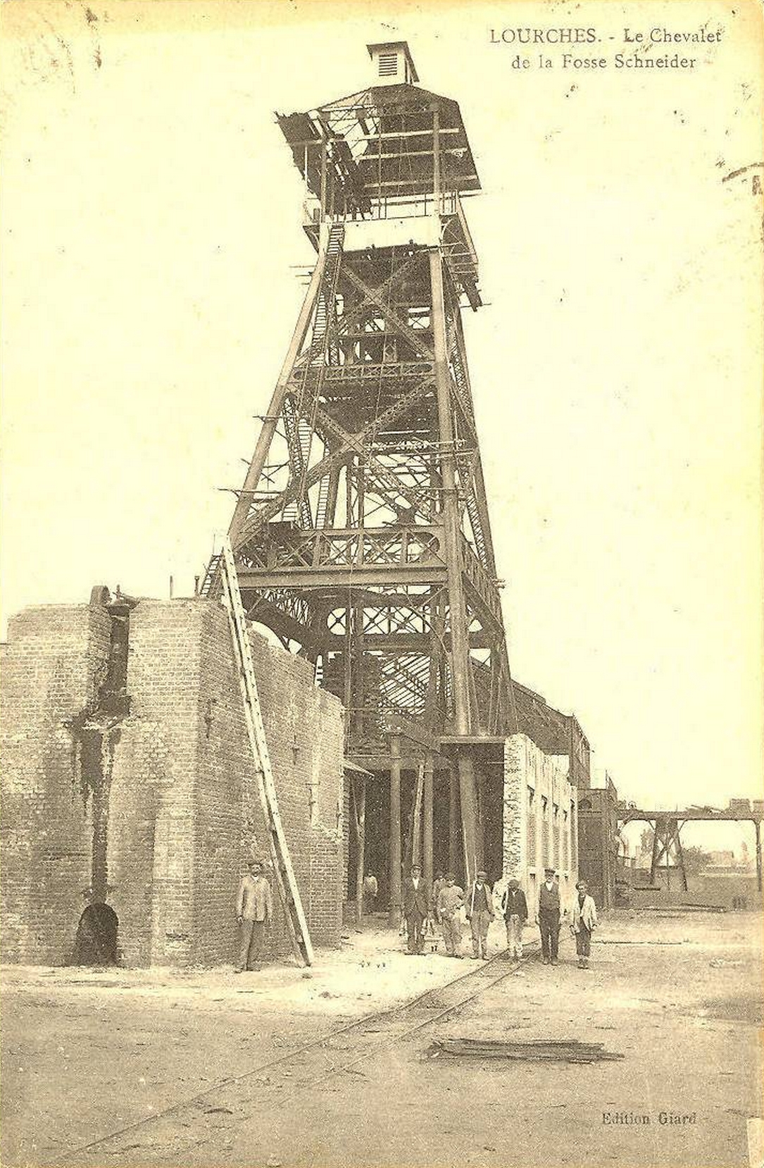 Fosse Schneider de la Compagnie des mines de Douchy, Lourches, Nord, Nord-Pas-de-Calais, France.